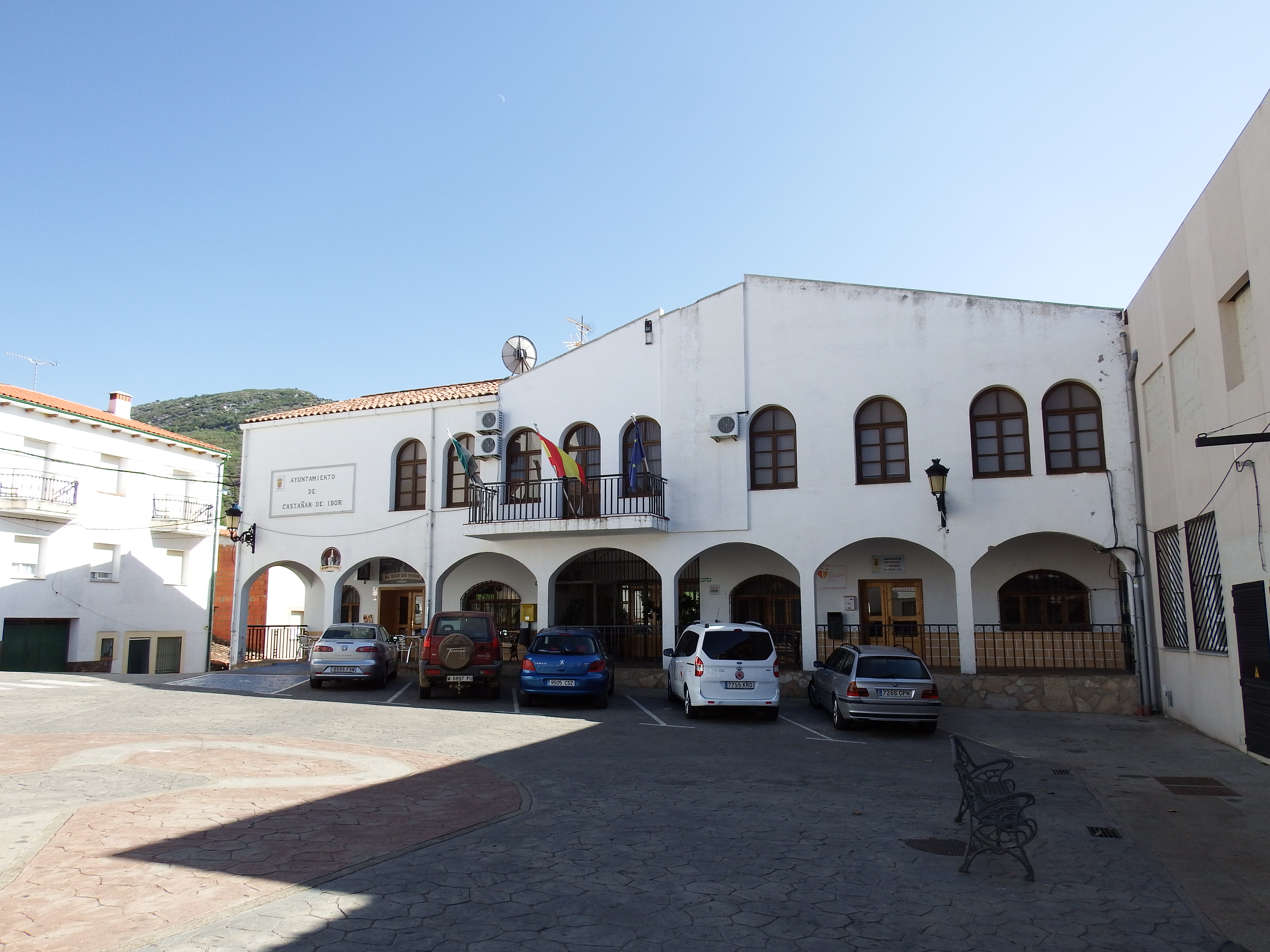 Castañar de Ibor